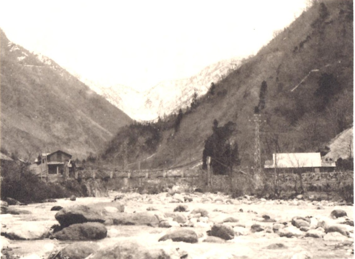 富山県藤橋